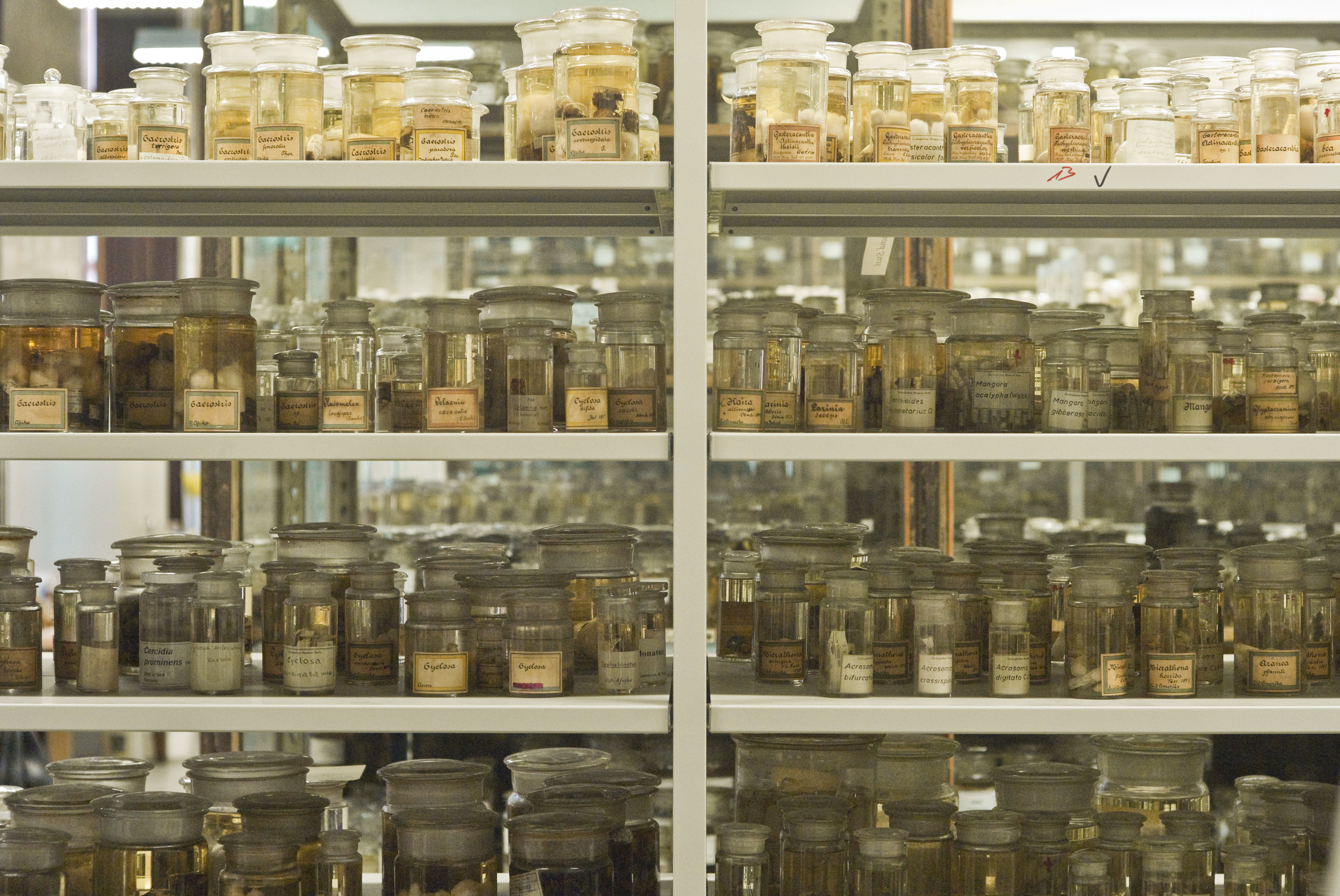 Collection of spiders at Museum für Naturkunde Berlin